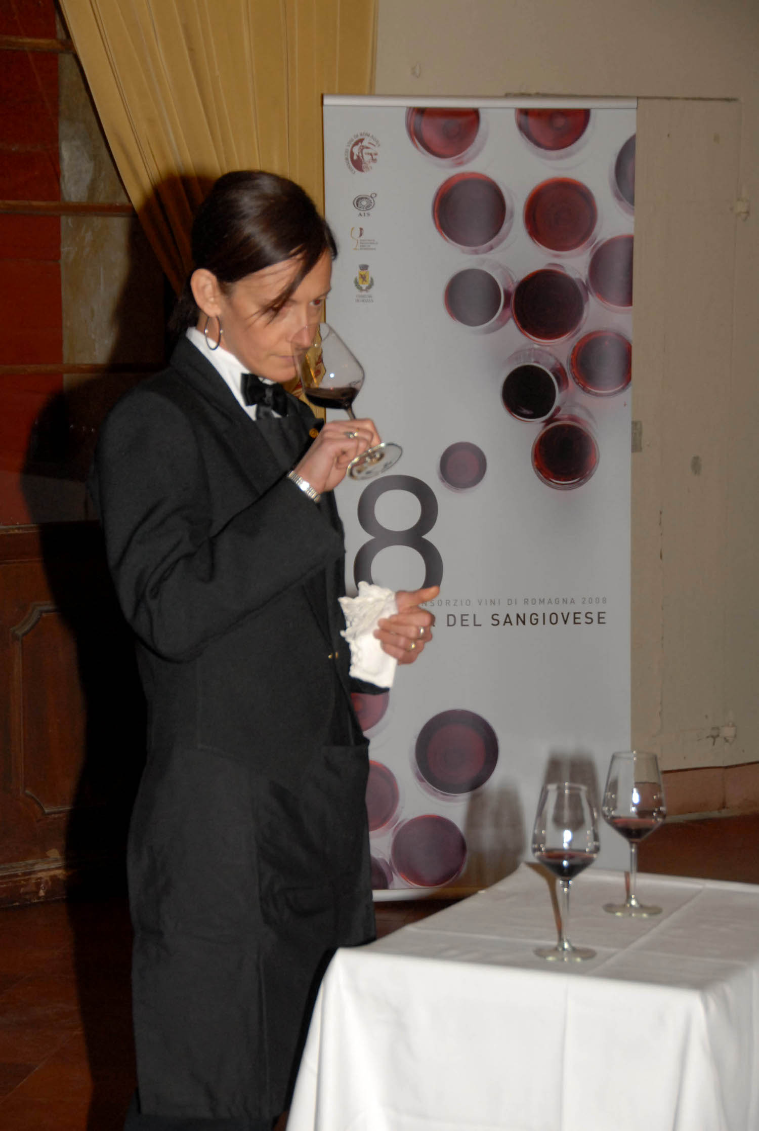 Simona Bizzarri, première au Master de Sangiovese 2008